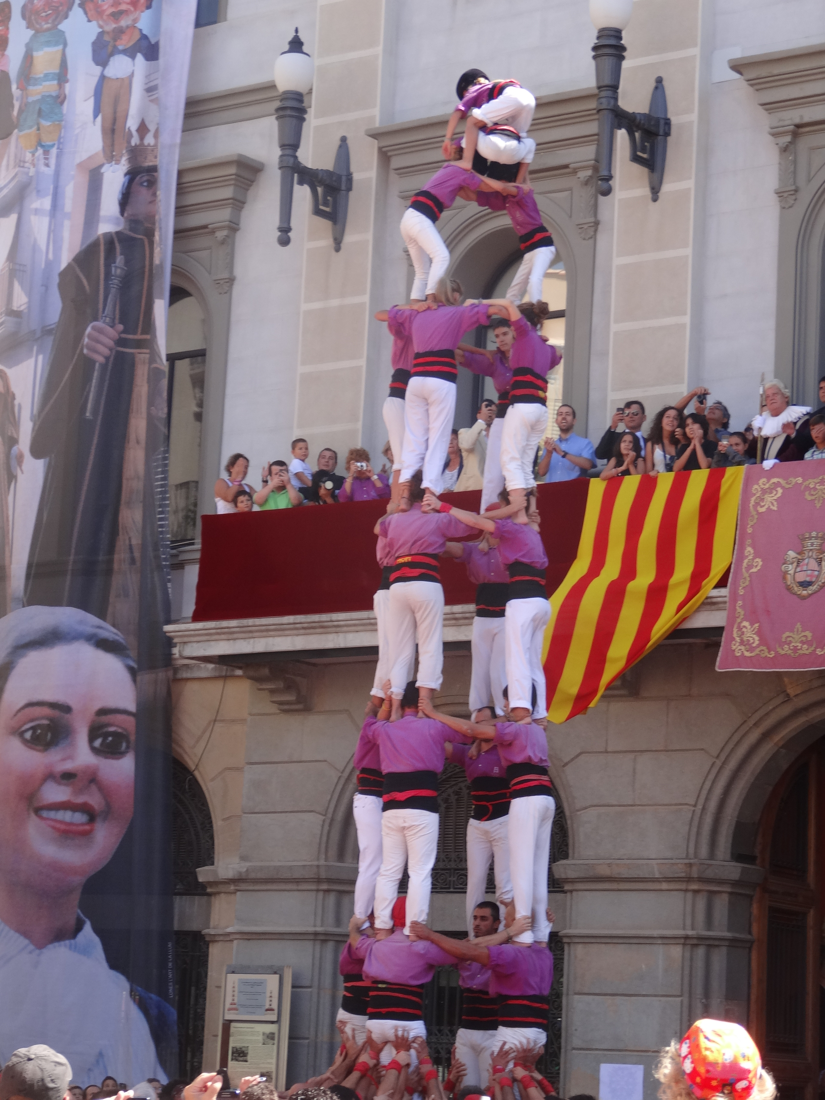 Actuació castellera de la Festa Major Major d'Igualada 2013, a la plaça de l'ajuntament. Moixiganguers 4de8 descarregat